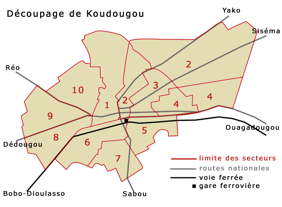 Paln du découpage de la ville de Koudougou en 10 secteurs